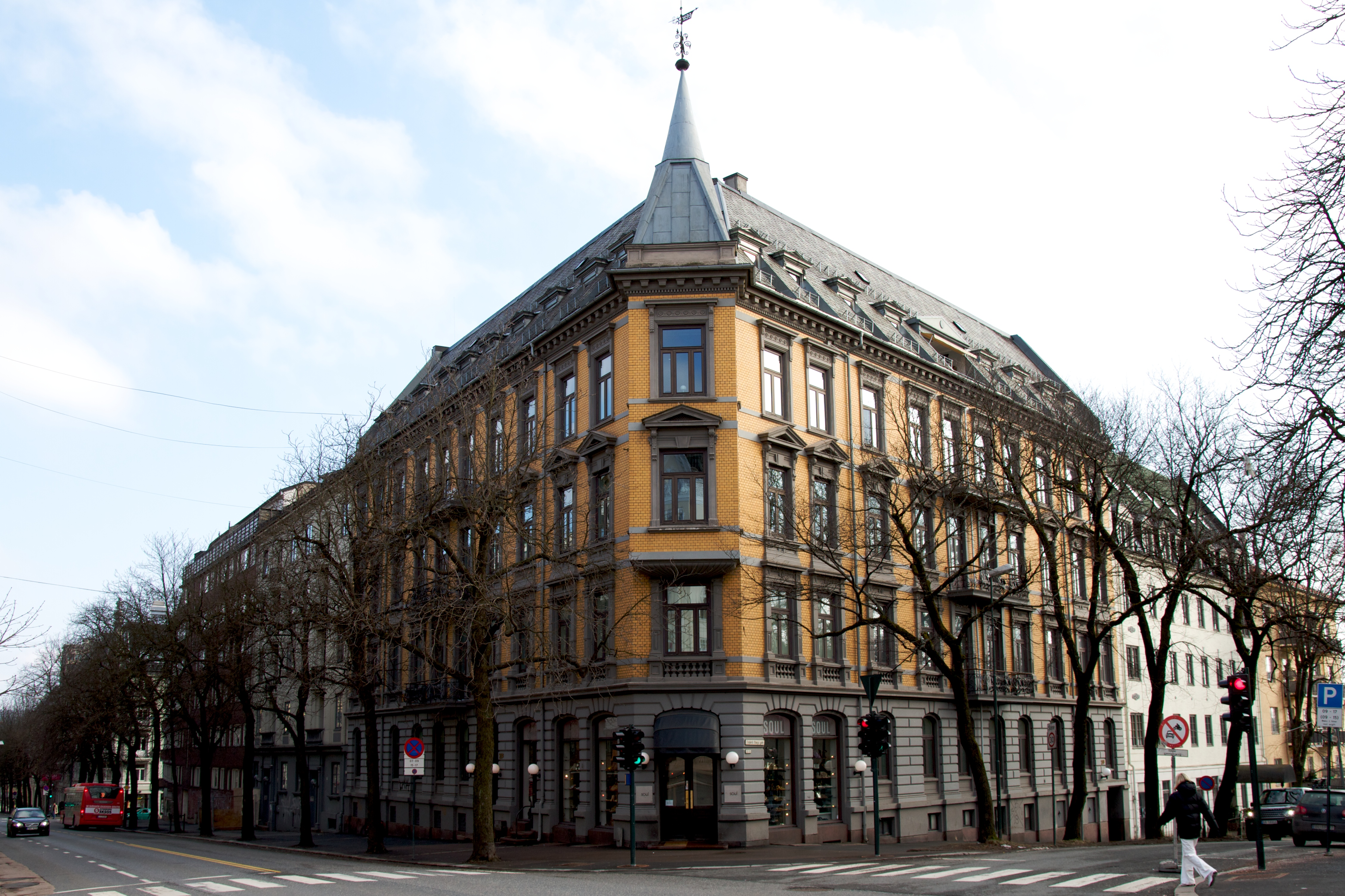 Bygdøy allé 28 B. Frogner i Oslo.